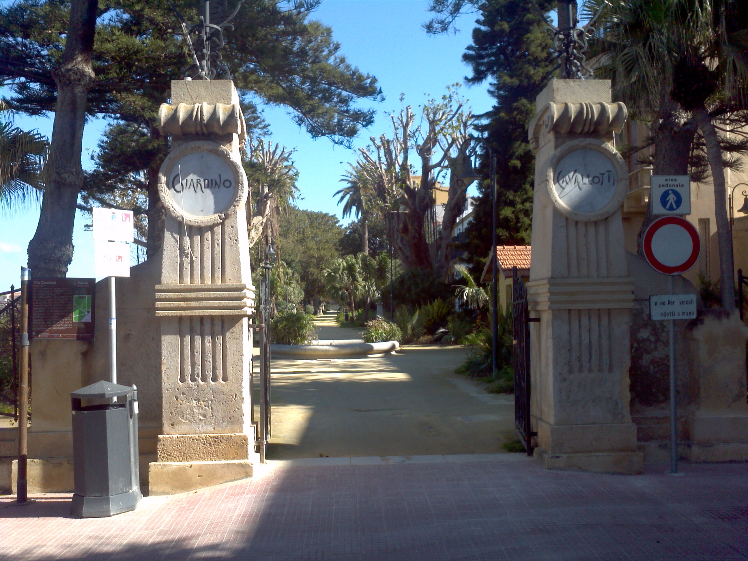 Marsala, Eingang zum Stadtpark mit Villa Cavallotti